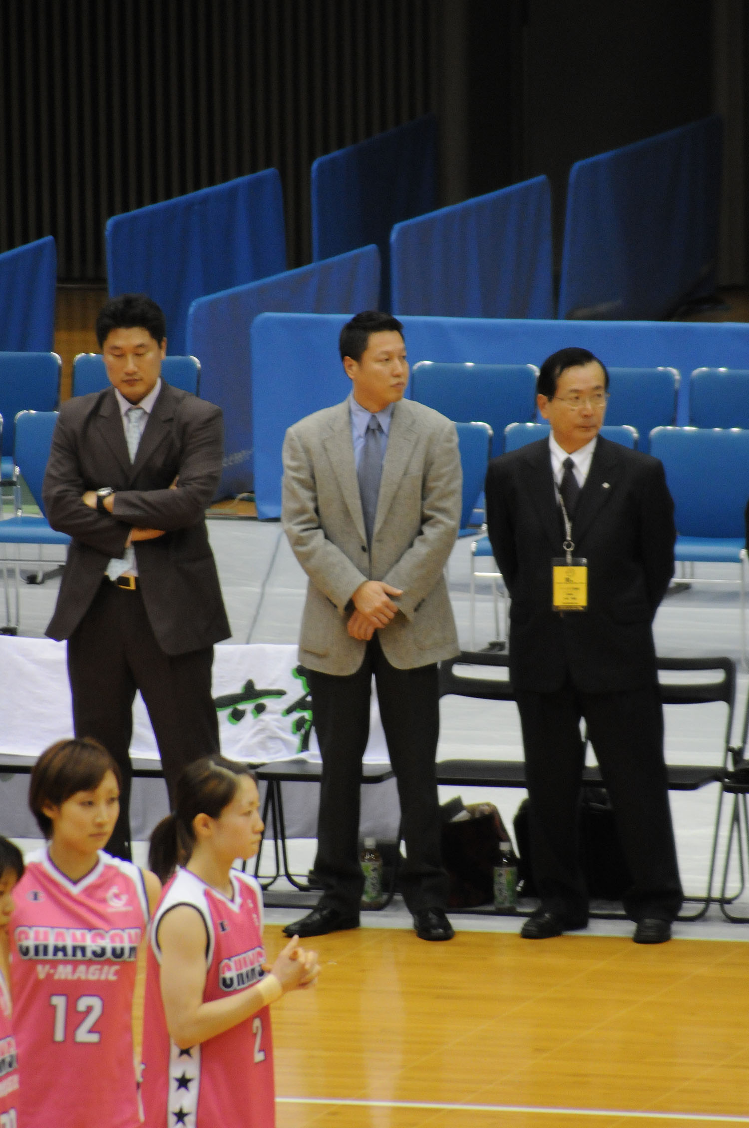 シャンソンVマジックの梅嵜周毅ヘッドコーチ。とどろきアリーナで。